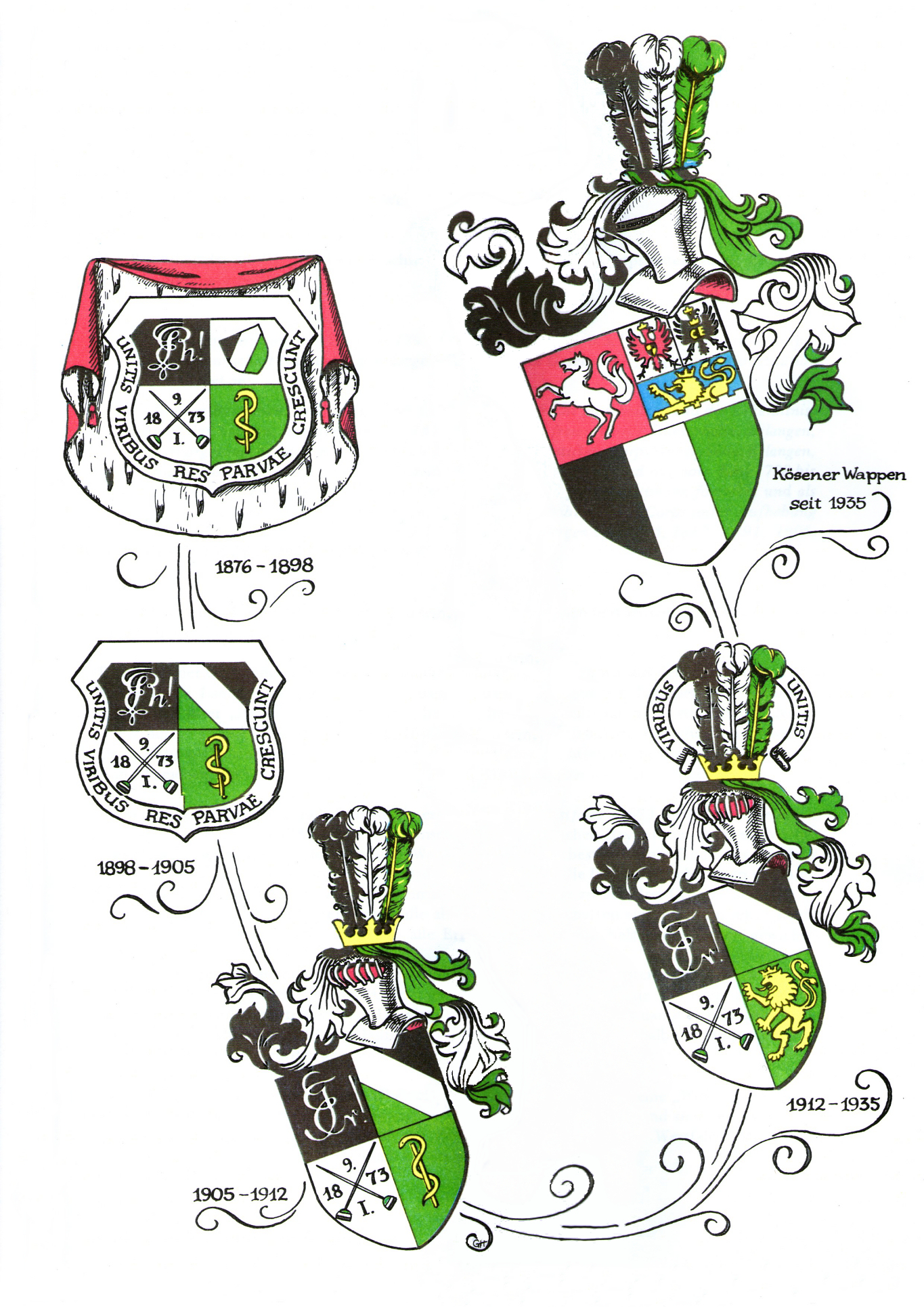 Wappen_von_1876_bis_heute